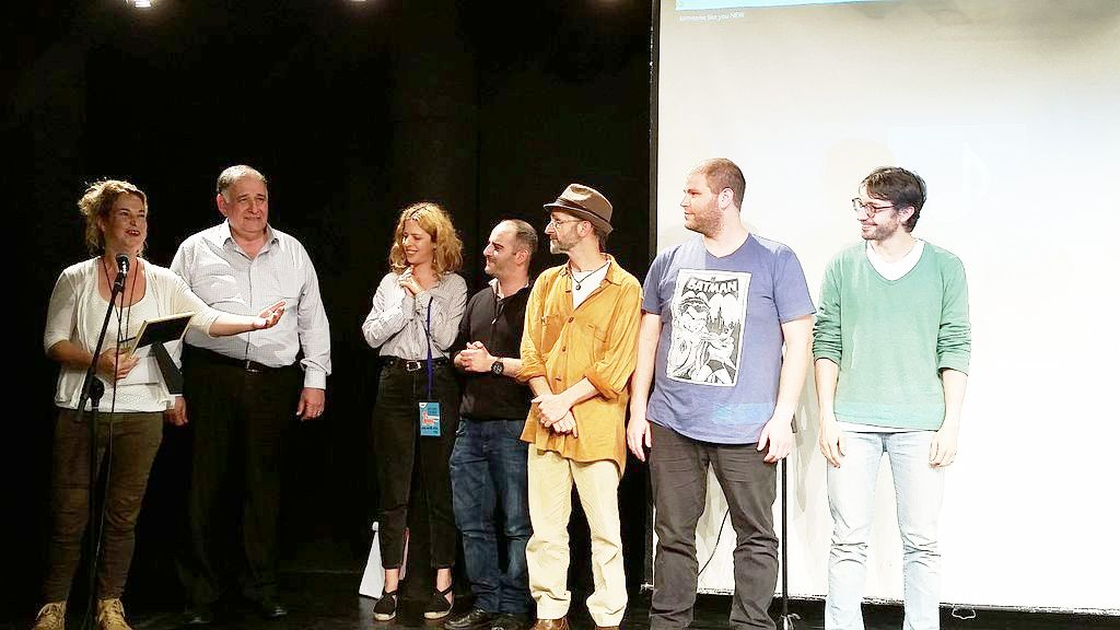 מתן פרס ראשון להצגה "הגשם של סבא אהרן" המבוססת על ספרו של מאיר שלו, בפסטיבל חיפה להצגות ילדים אפריל 2017